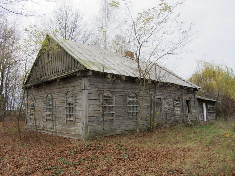 Гаслаўшчына. Сядзібны дом